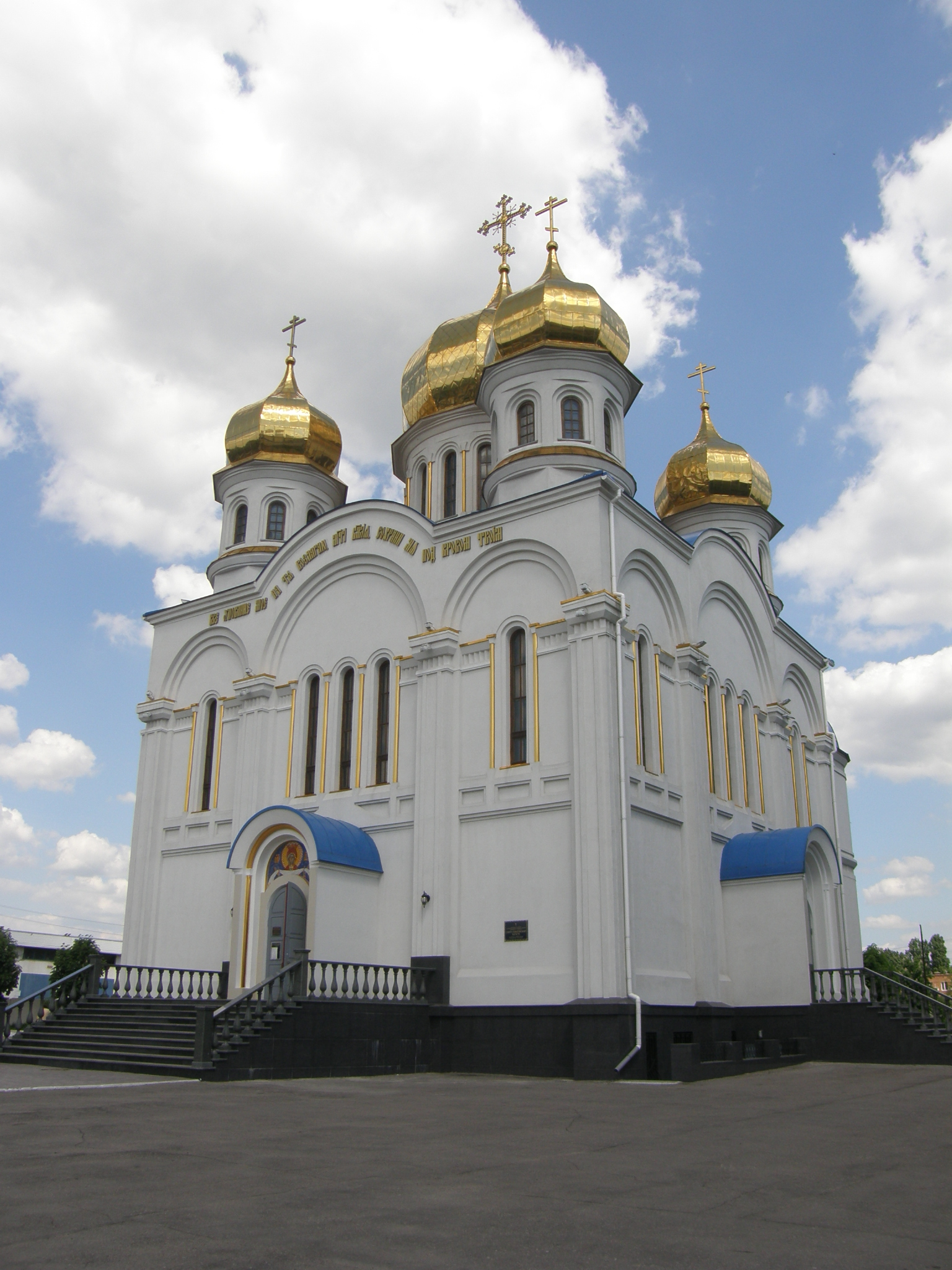 Свято-Покровский храм в Донецке